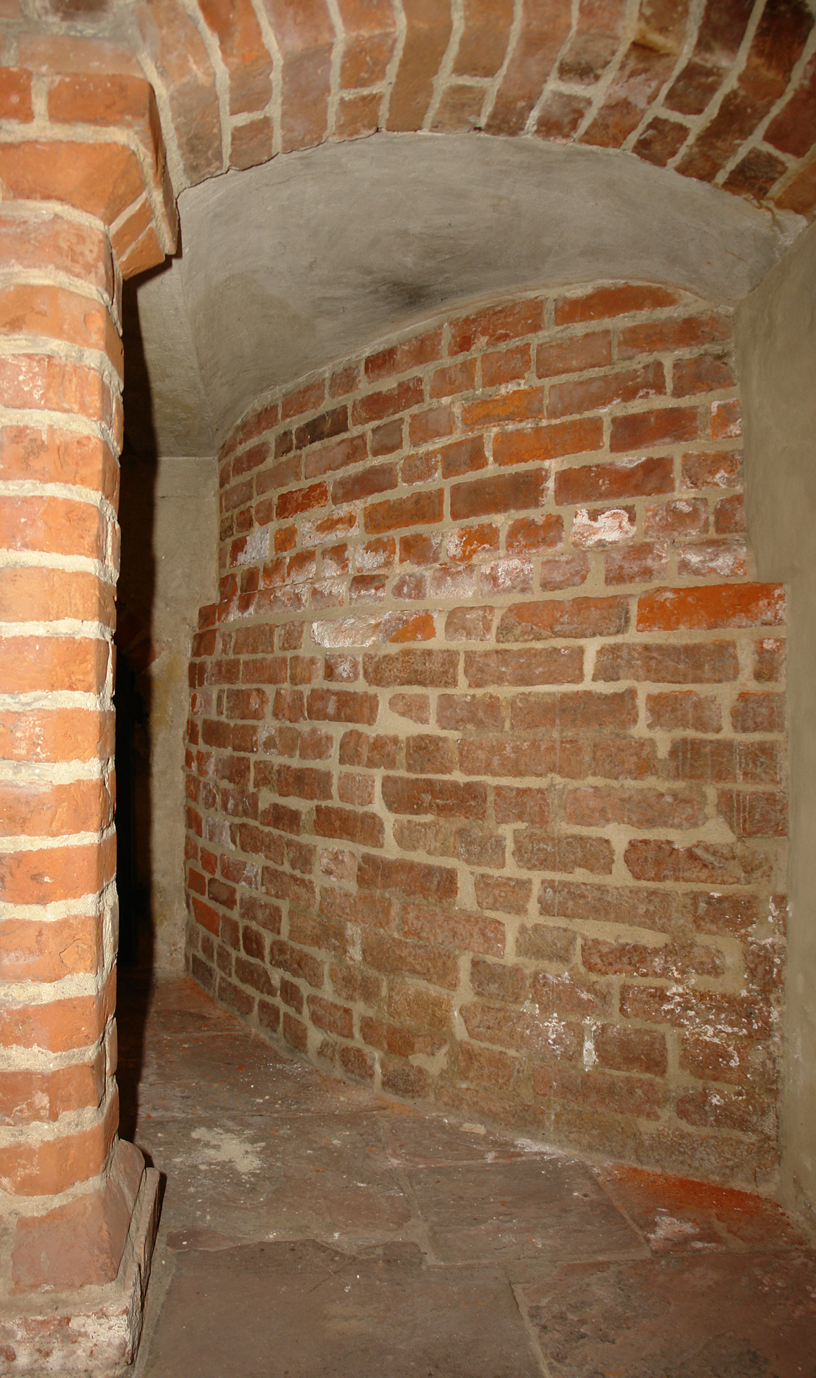 Stadtmauer in Bremen, Altenwall 9.Das abgebildete Objekt ist ein geschütztes Kulturdenkmal in der Freien Hansestadt Bremen, mit der Nr. 0874 beim Landesamt für Denkmalpflege registriert.